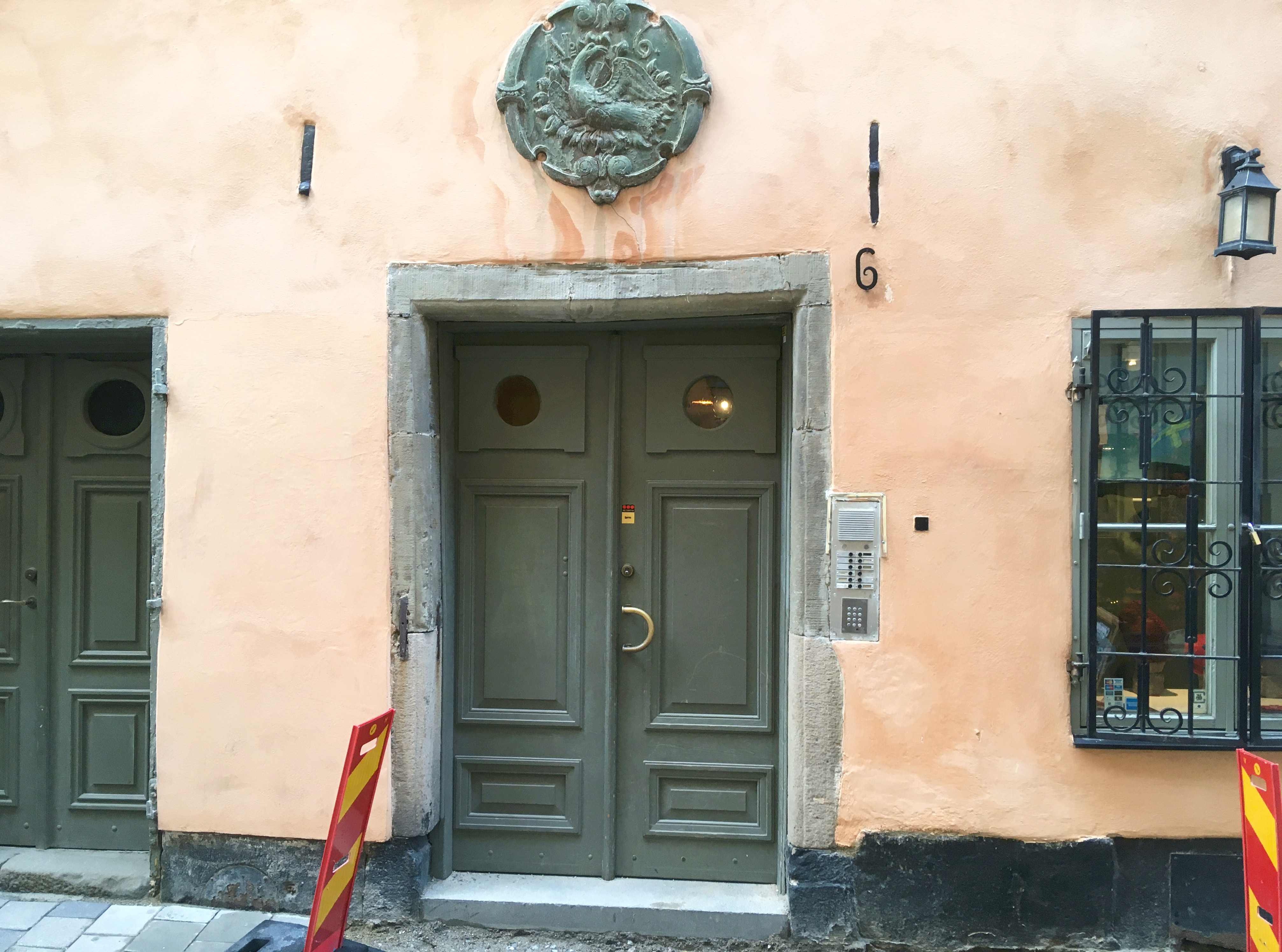 Österlånggatan 6